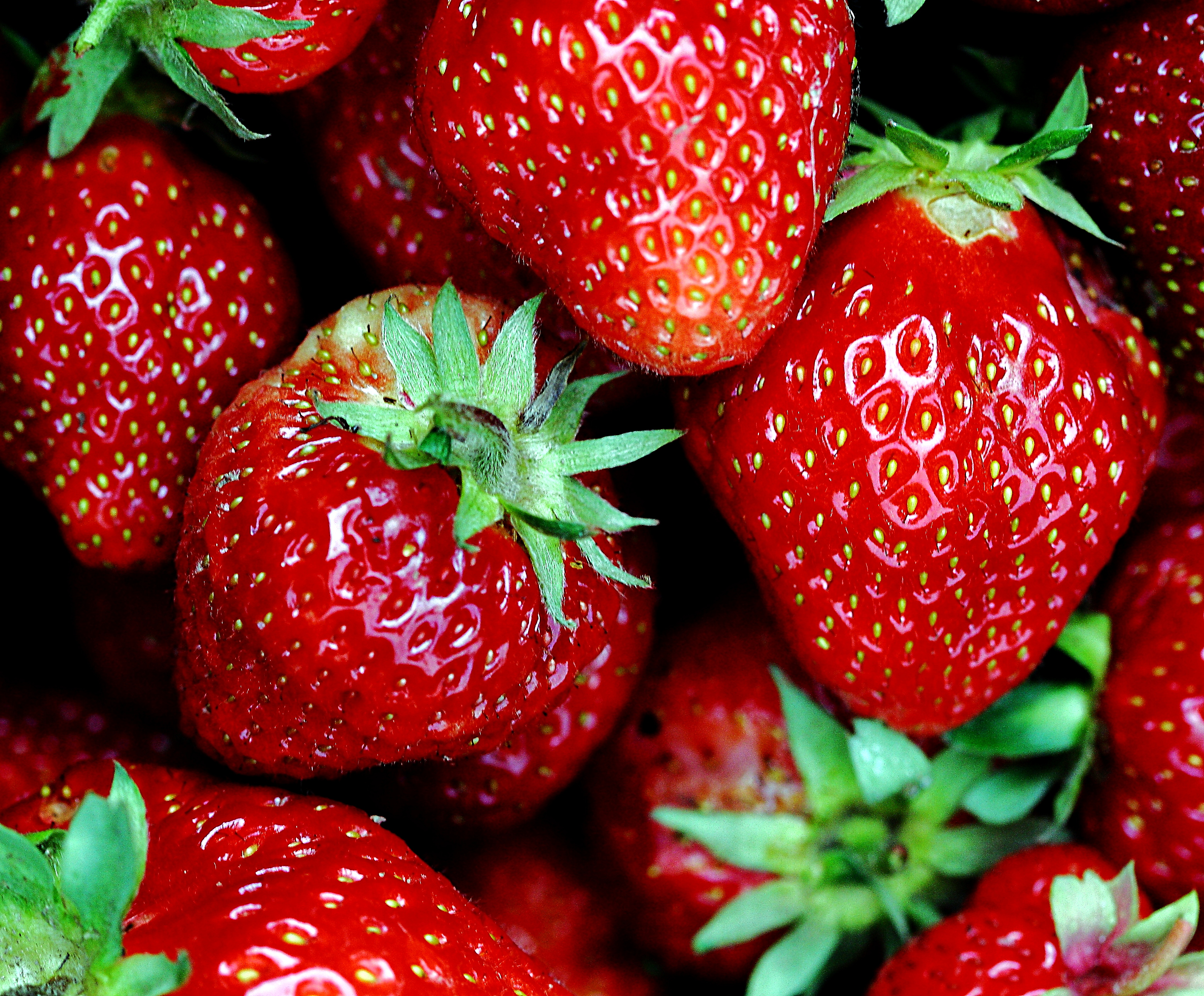 Erdbeeren